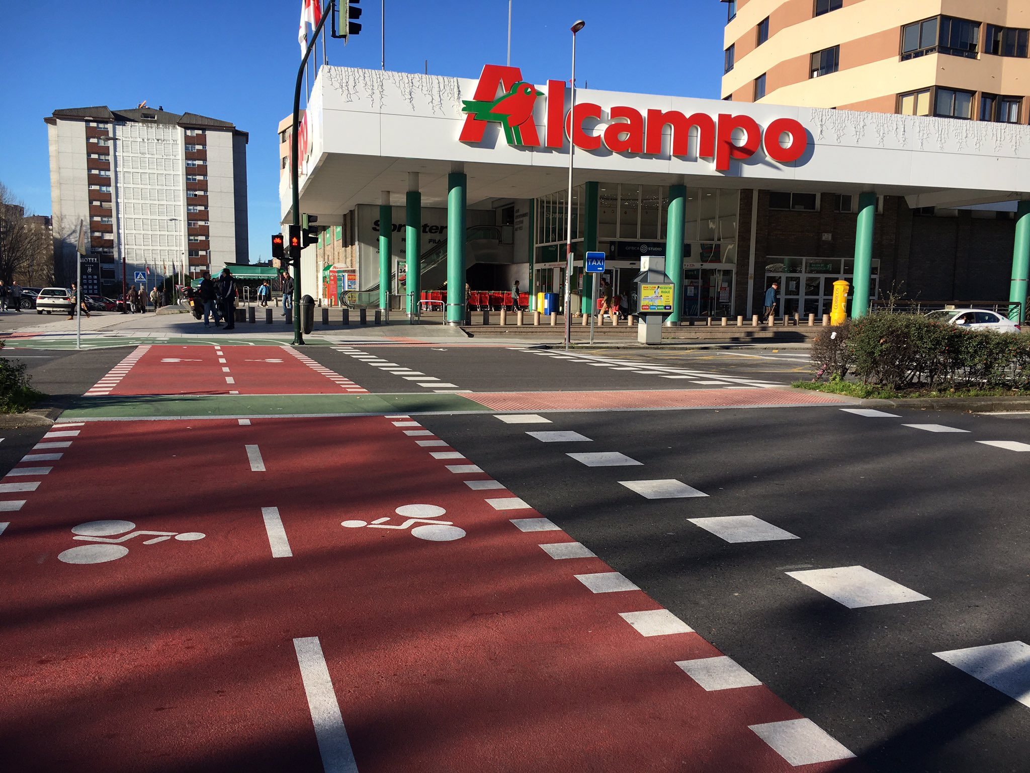 Carril bici en Coya (Vigo)